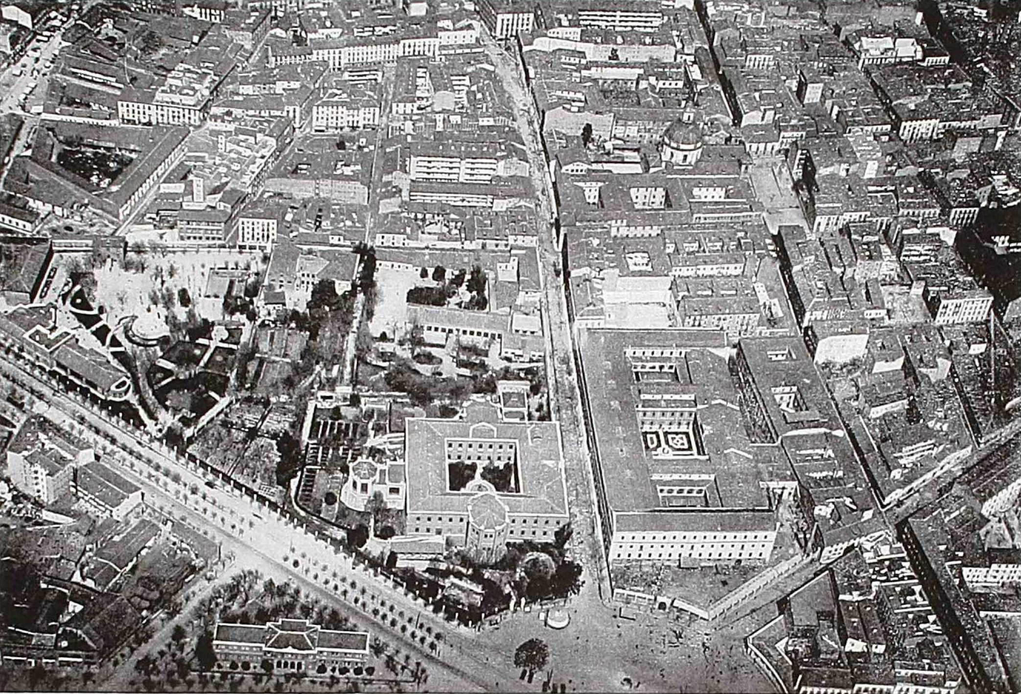 Vista panorámica de la Glorieta de Embajadores y Ronda de Toledo. Aparece en la memoria de Información sobre la Ciudad, publicado en julio de 1929 por el Ayuntamiento de Madrid para permitir la elaboración de propuestas para el concurso internacional de reordenación de la ciudad.